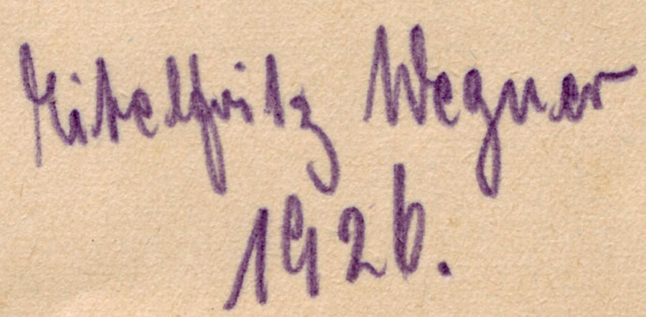 Gescannt im Januar 2019 vom Vorsatz eines Buches meines Vaters